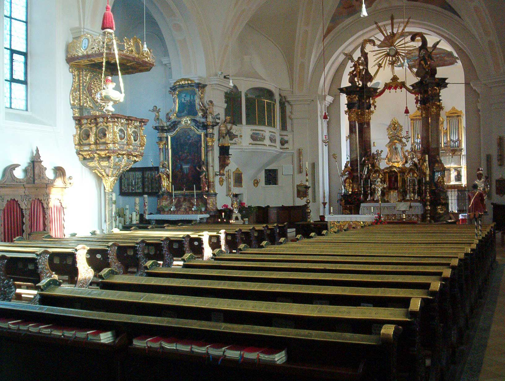 Wallfahrtskirche (Innenansicht) in 93453 Neukirchen beim Heiligen Blut, Bayern, Deutschland